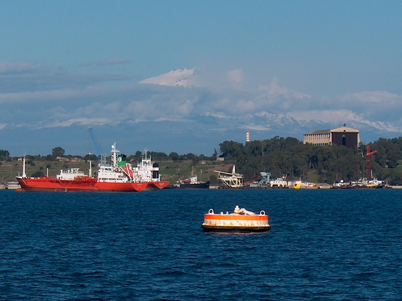 Veduta dell'Etna dal porto di Augusta (SR), a lato l'Hangar dirigibili